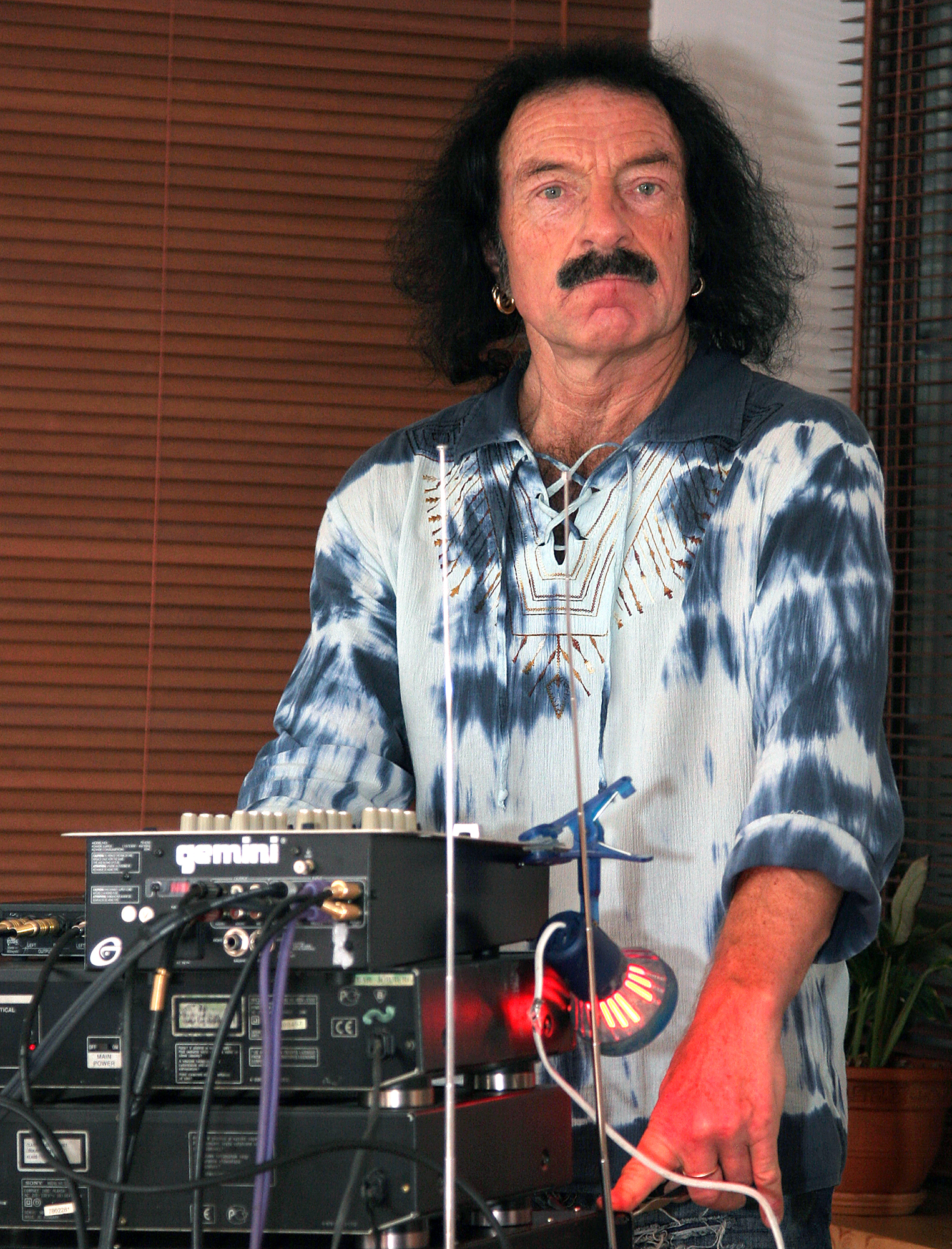 Üllar Jörberg, eesti laulja 06